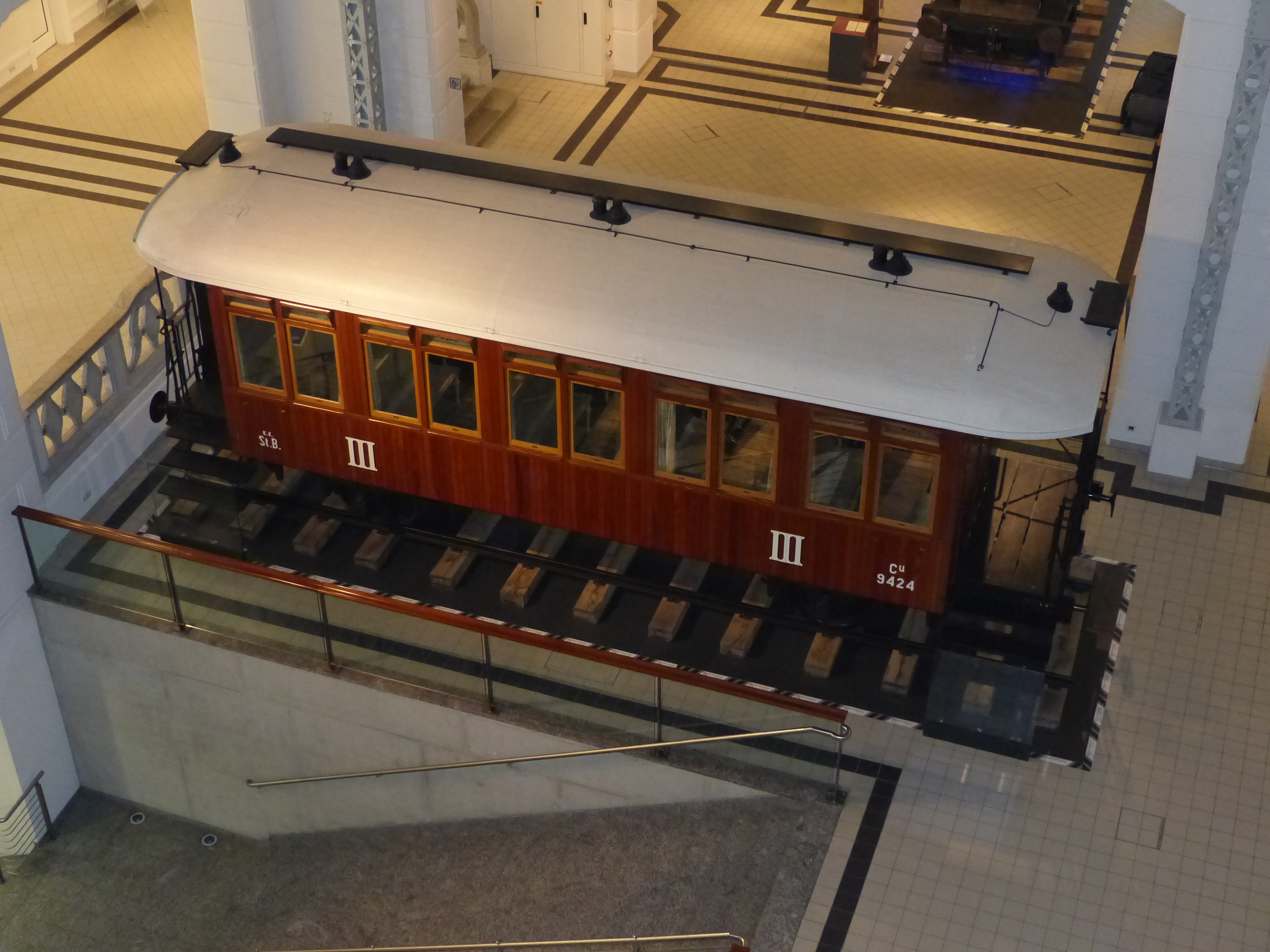 Personenwagen Cu 9424, III. Klasse, Wiener Stadtbahn um 1900; Exponat im Technischen Museum Wien